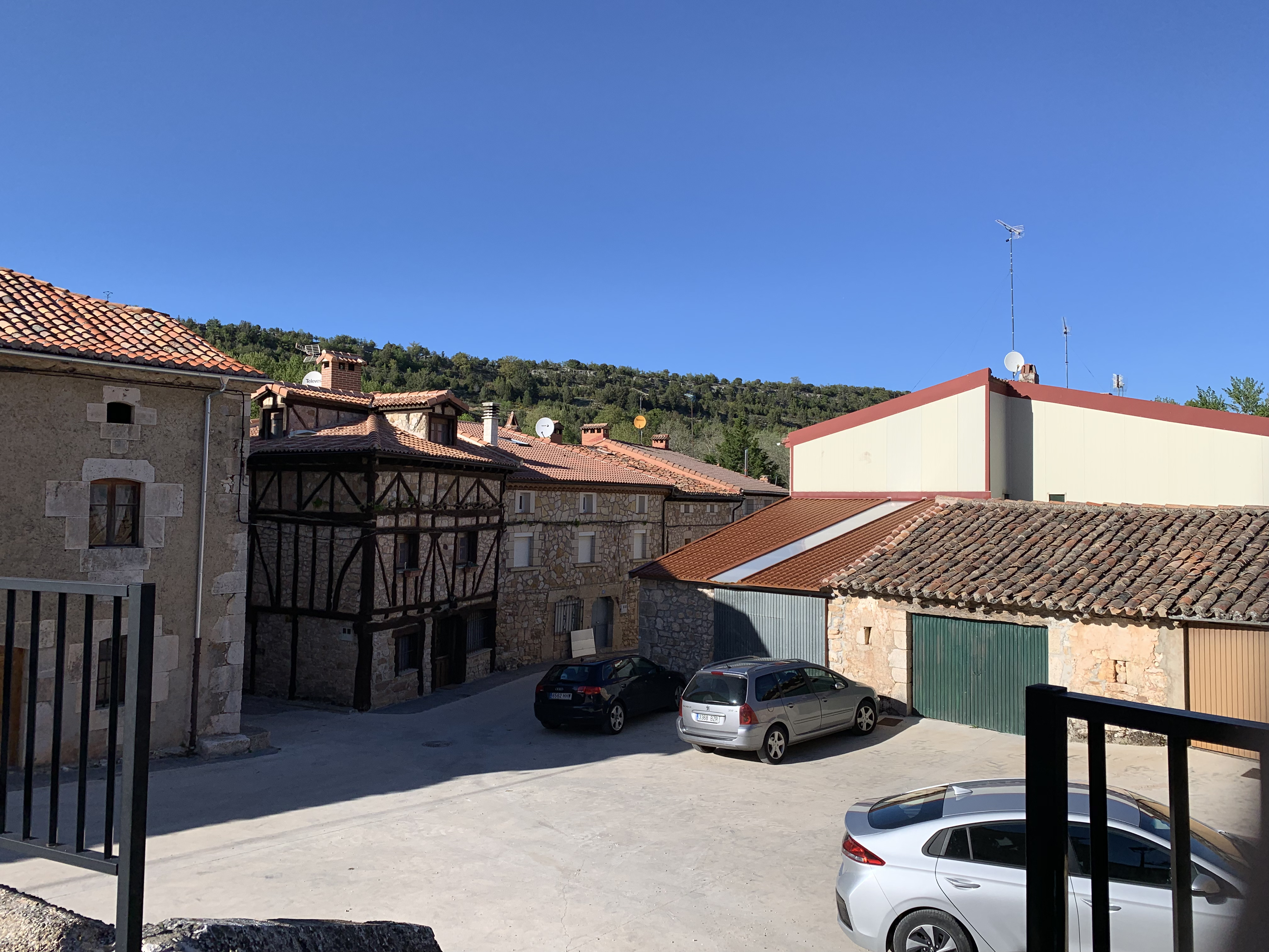 Tejada (Burgos)